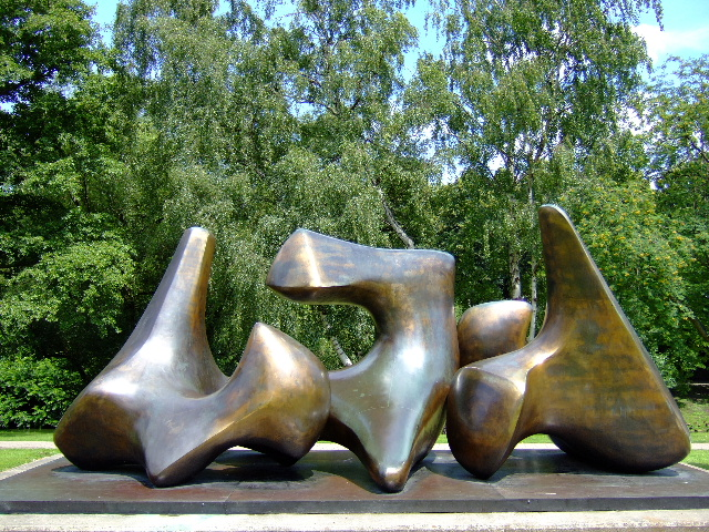 Henry Moore: Wirbel (1968 / 1969) - Standort: Münster Himmelreichallee 40